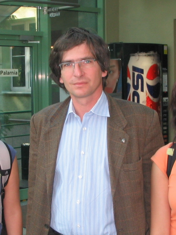 Krzysztof Skowroński